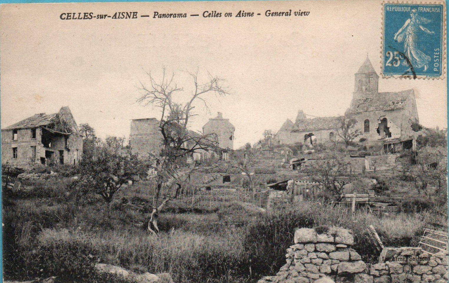 Ruines du village en 1919.